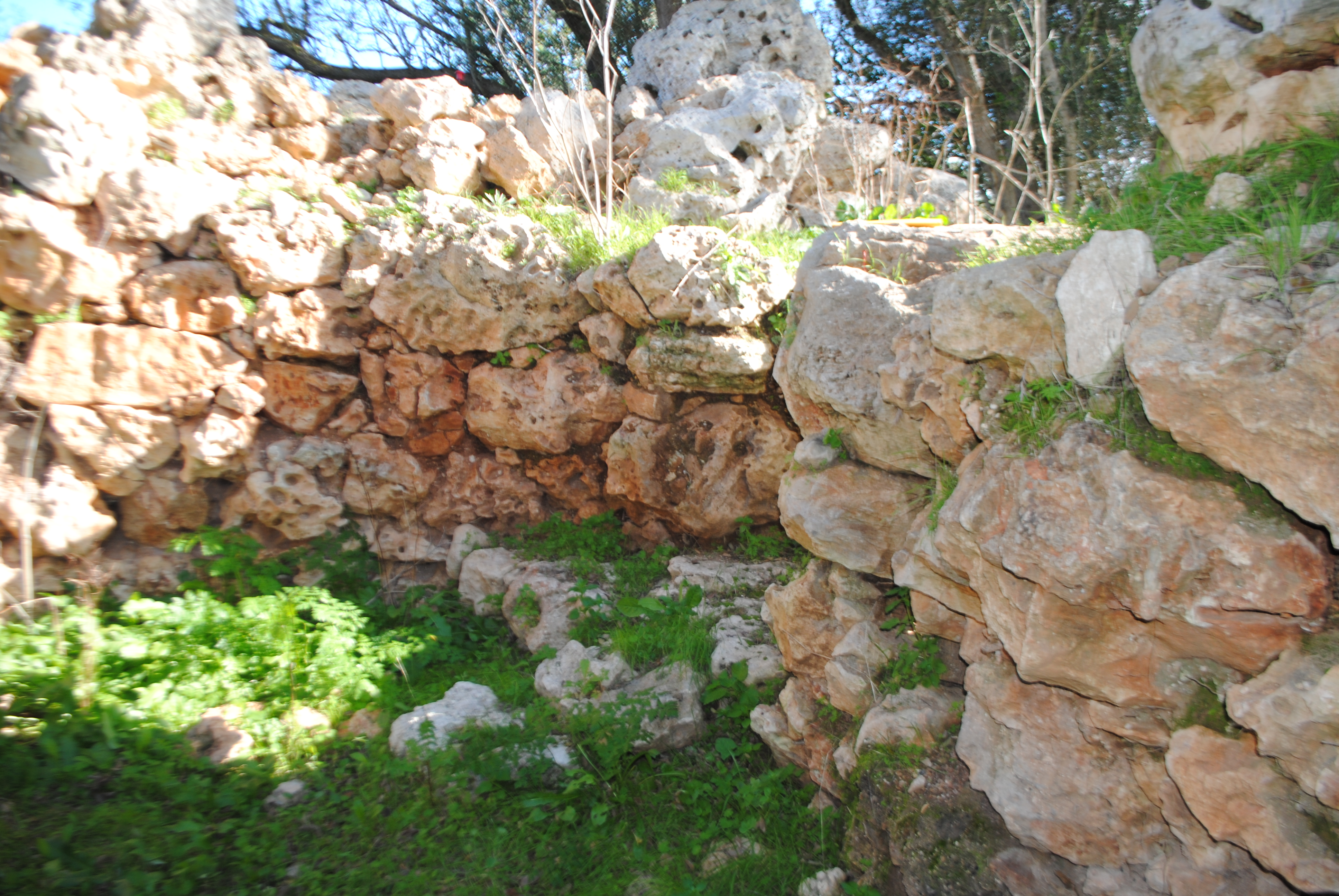 Aspecte de la paret d'un talaiot de Cas Canar